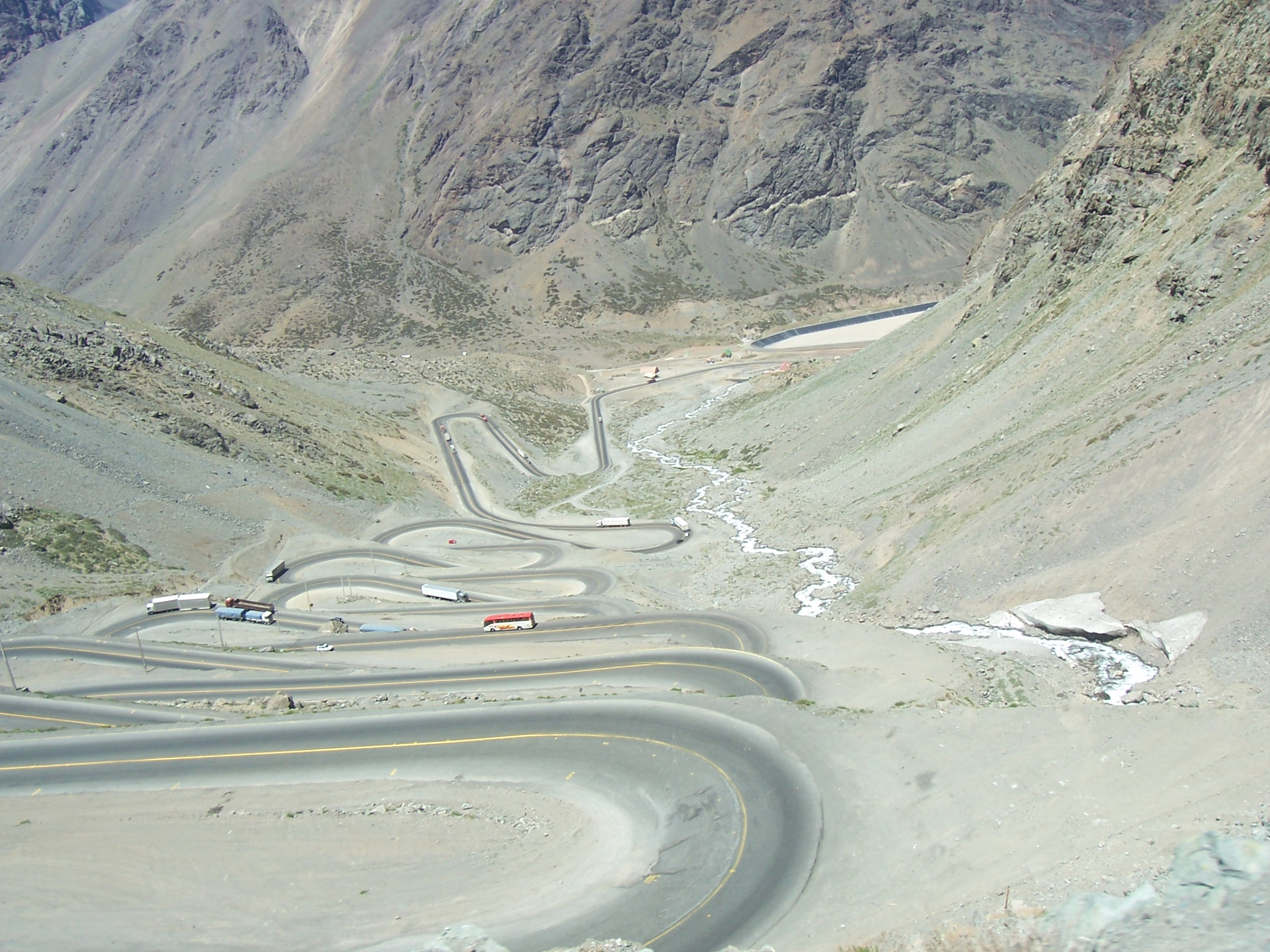 La carretera CH-60 que comunica a Chile con la Argentina, en el área conocida como los caracoles.